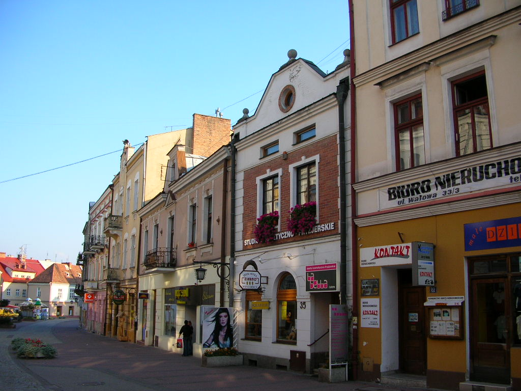 Ulice Wałowa v centrální části Tarnowa